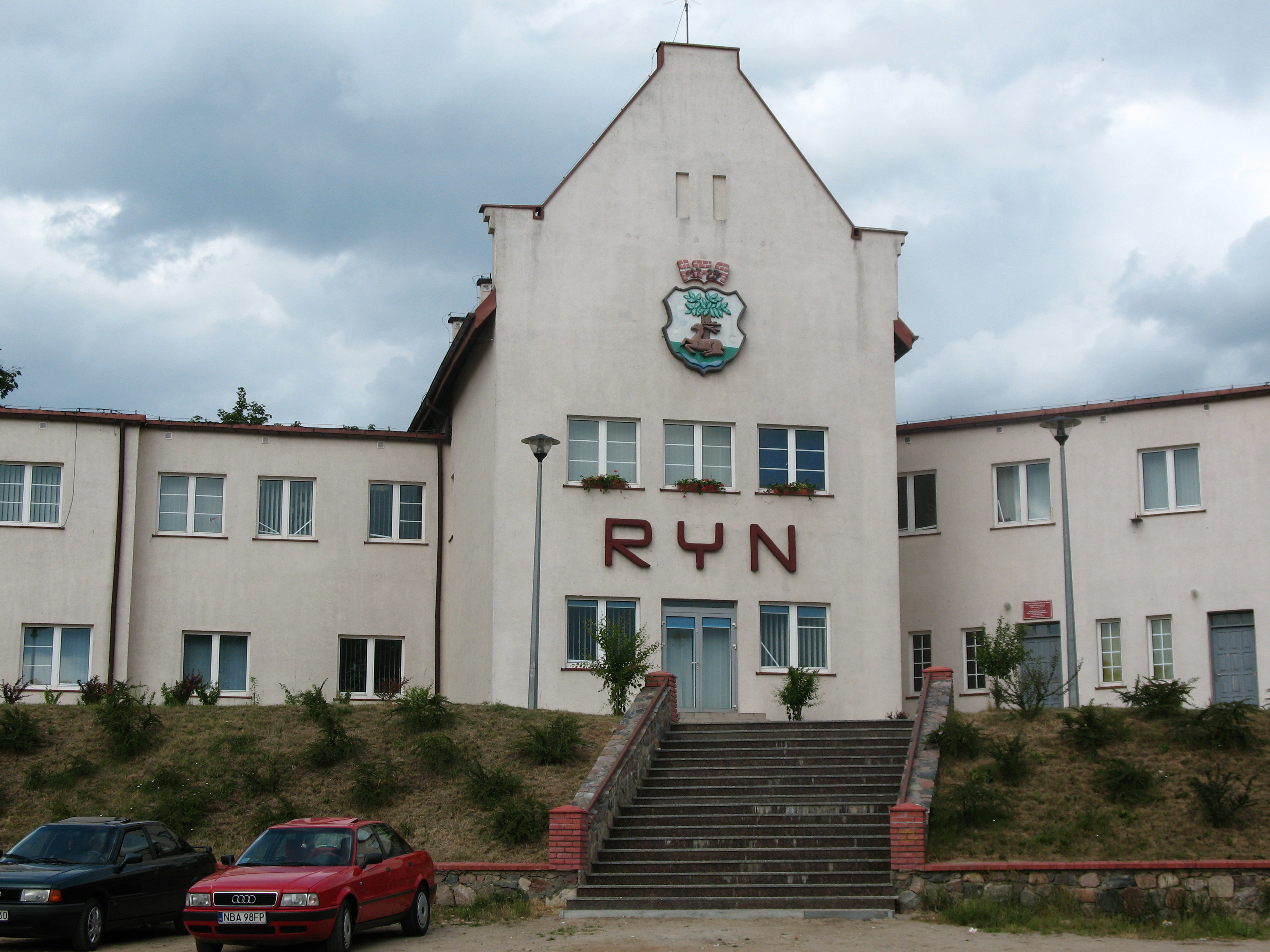 Urząd miasta i gminy Ryn.